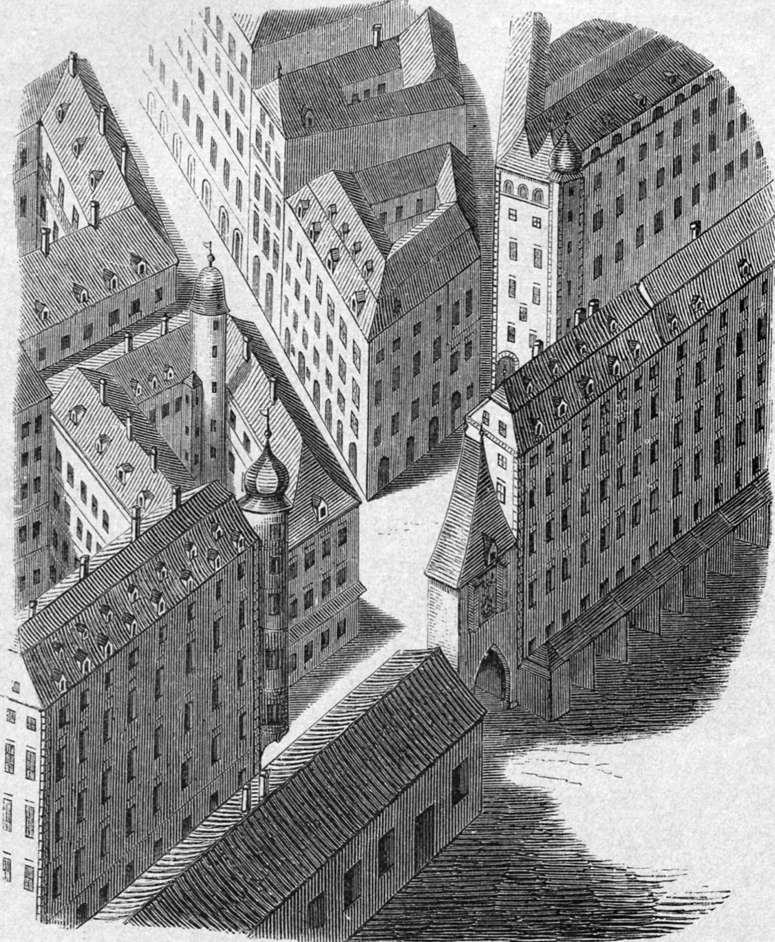 Das ehemalige Rotenturmtor in Wien aus der Vogelperspektive